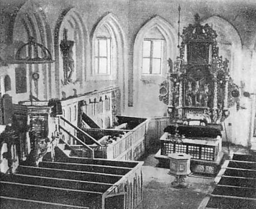 Wnętrze nieistniejącego kościoła w Trzęsaczu